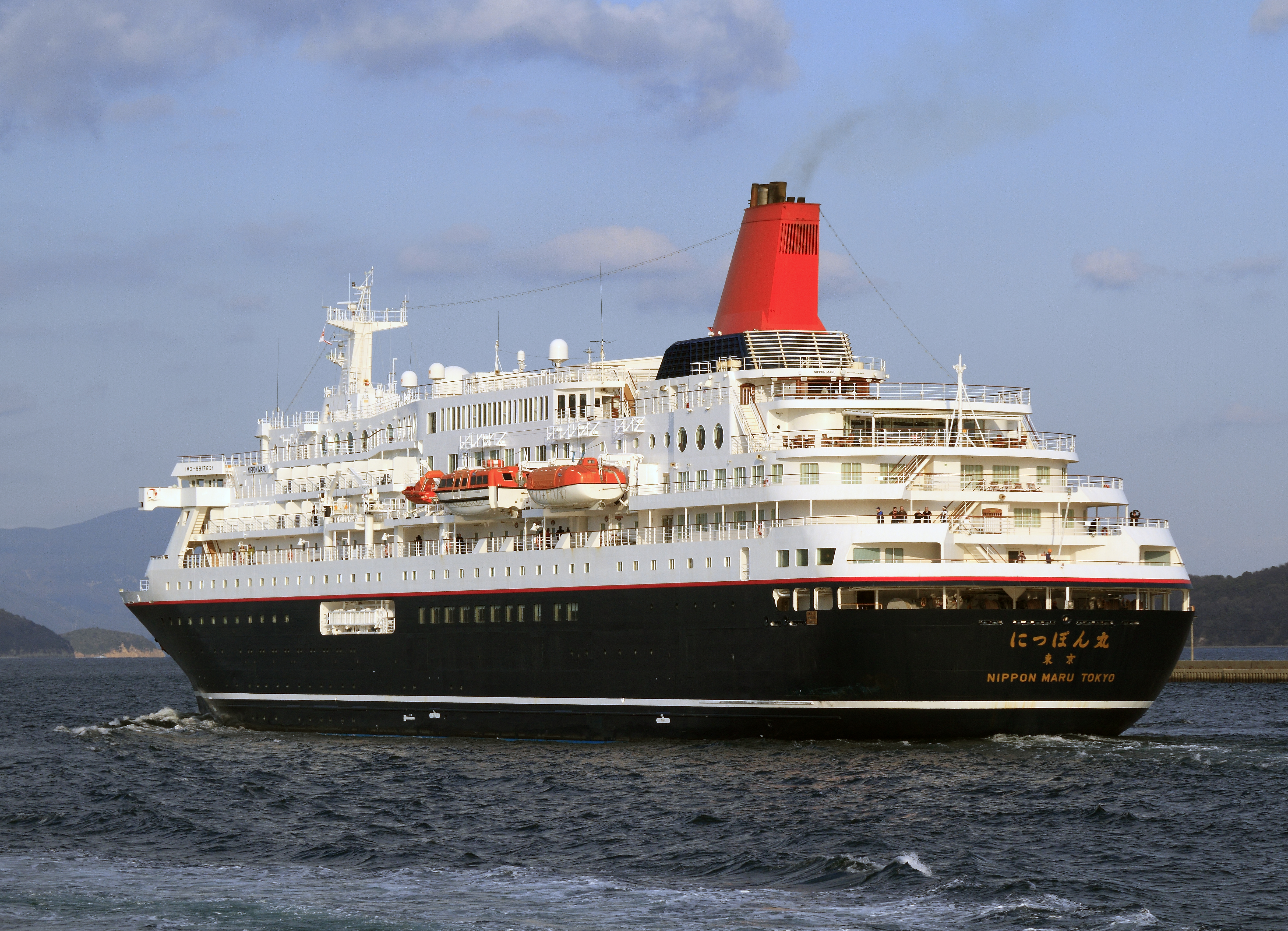 商船三井客船 にっぽん丸 高松港